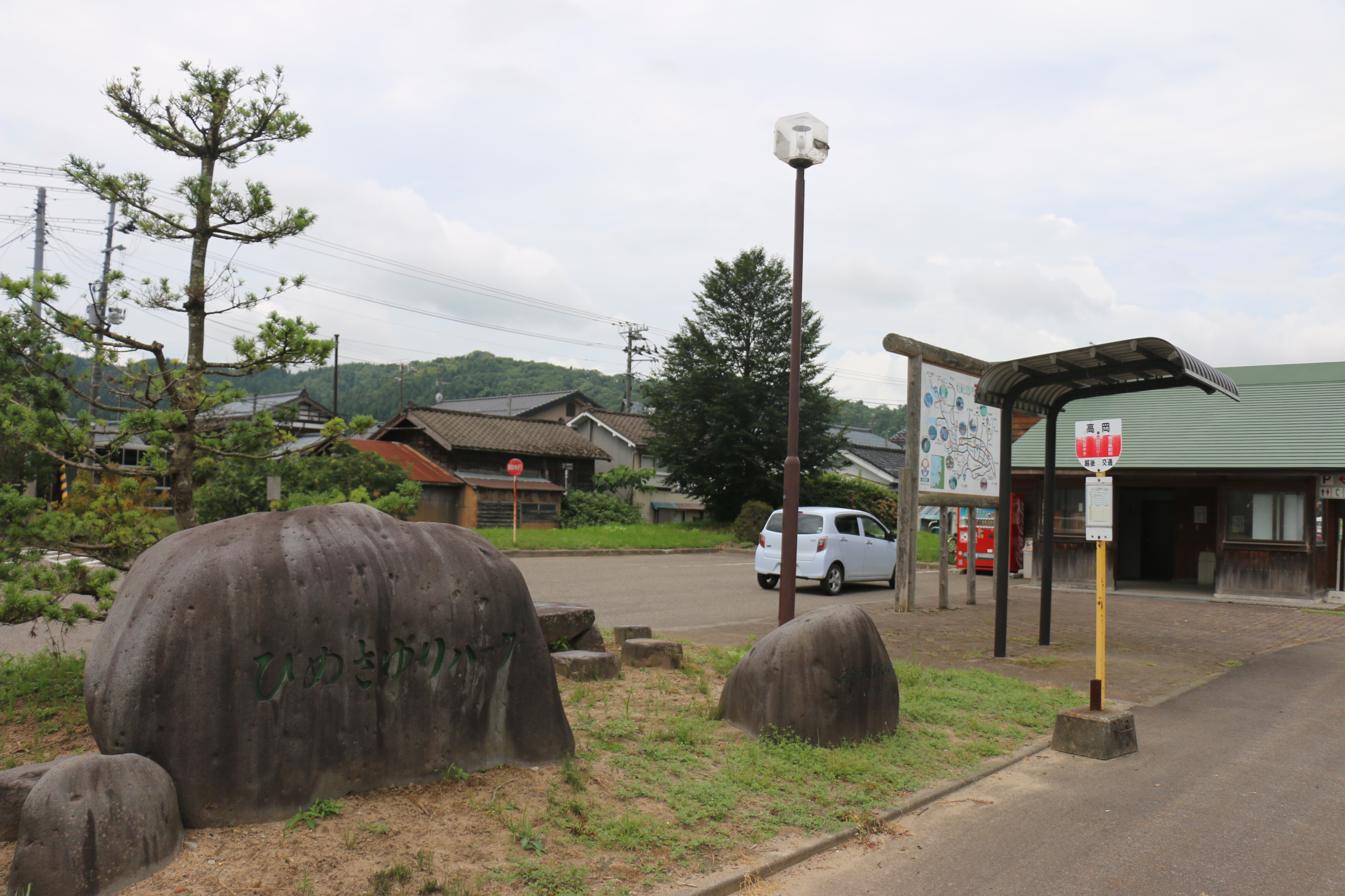 ひめさゆりパーク